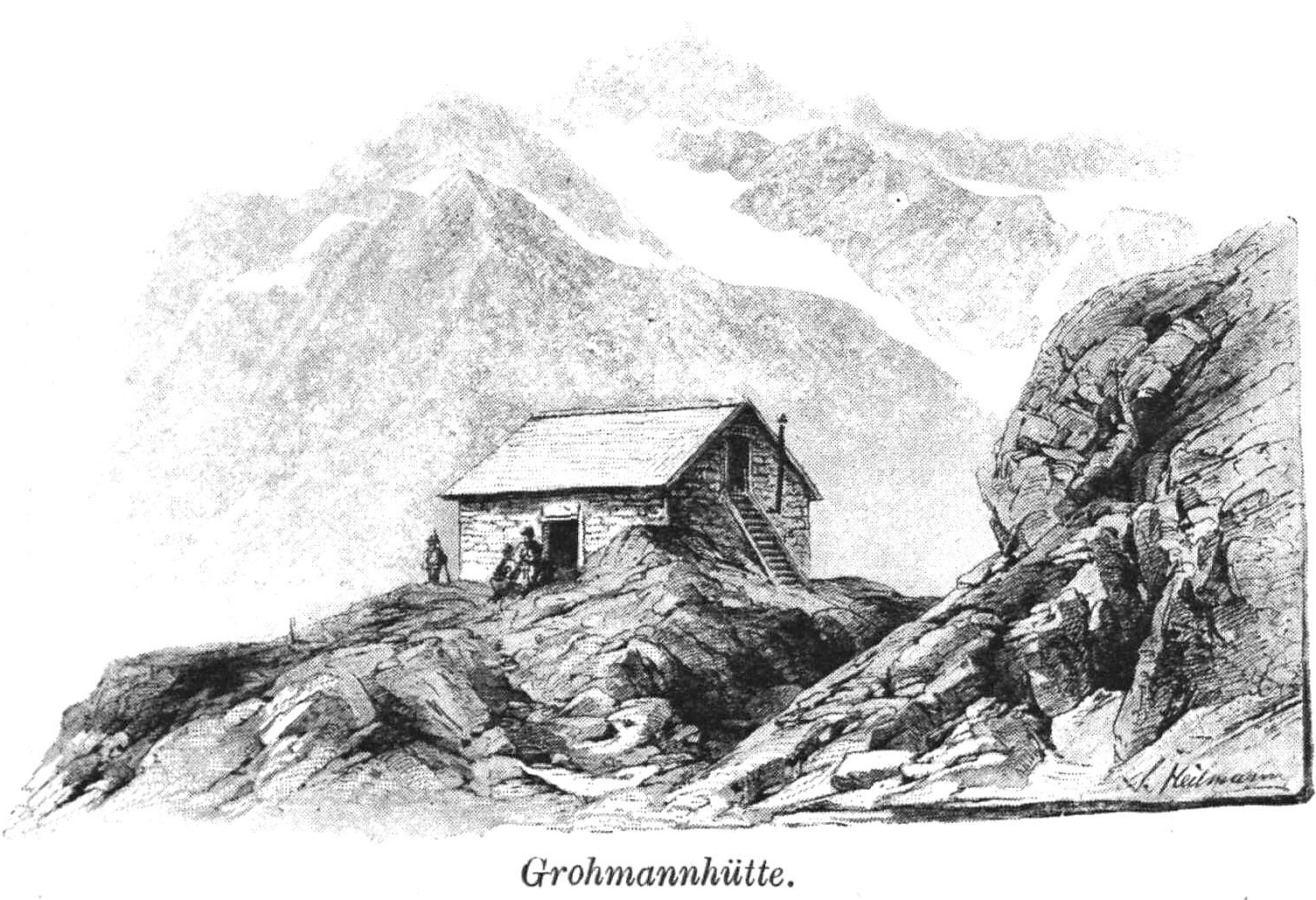 Grohmannhütte aus Zeitschrift des Deutschen und Oesterreichischen Alpenvereins 1894 Band 25